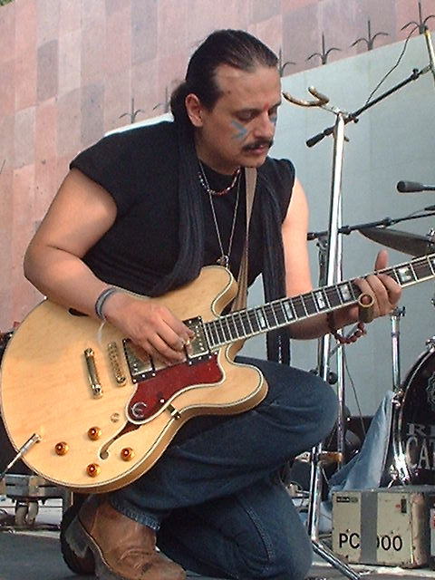 El músico de blues mexicano José Cruz en el Centro Cultural José Martí